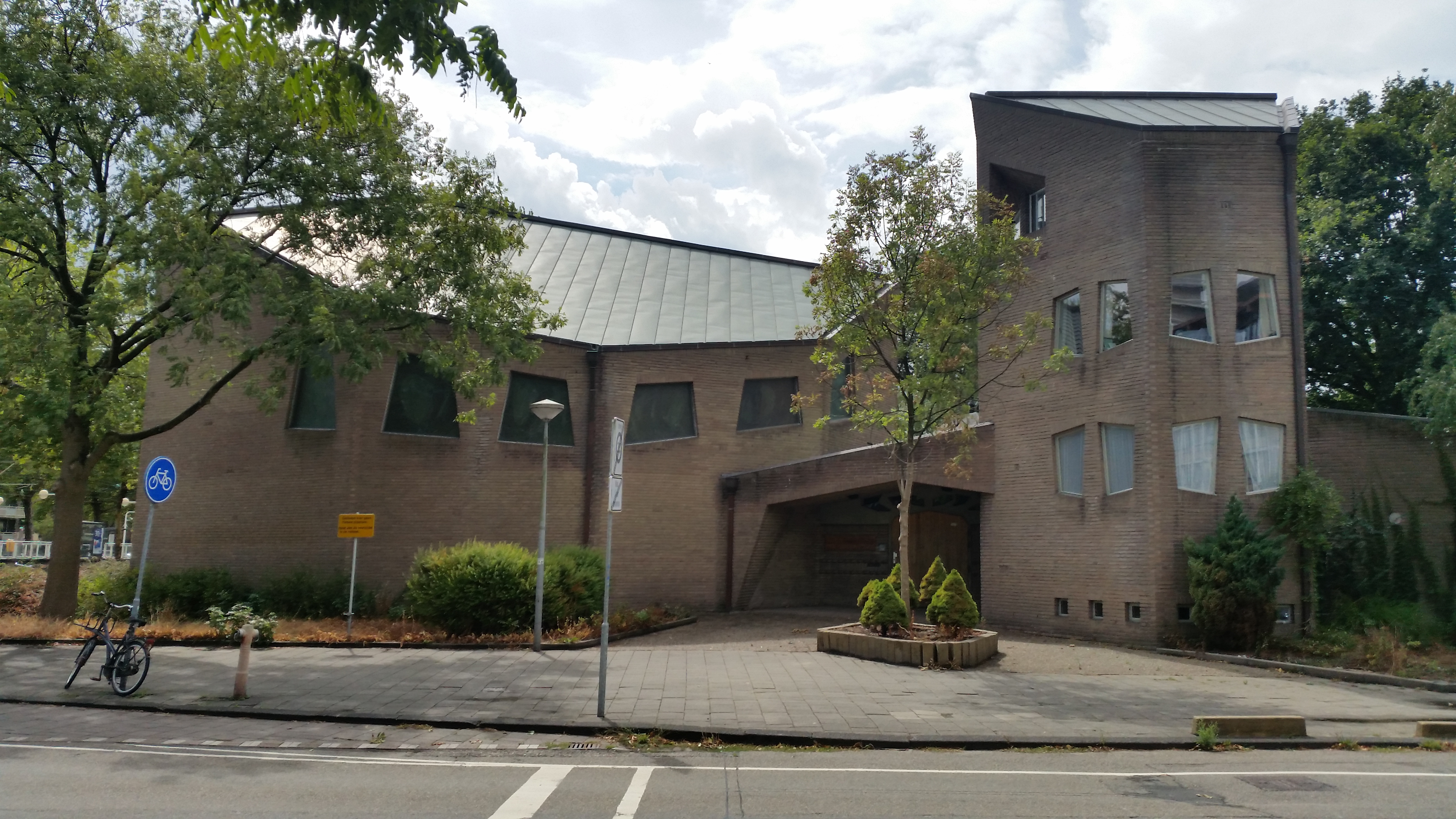 Andrieskerk, Amsterdam, ingang